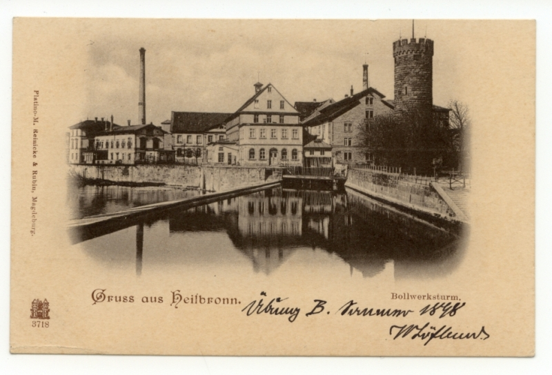 Bollwerksturm mit Papierfabrik Schaeuffelen und Neckarwehr, 1898